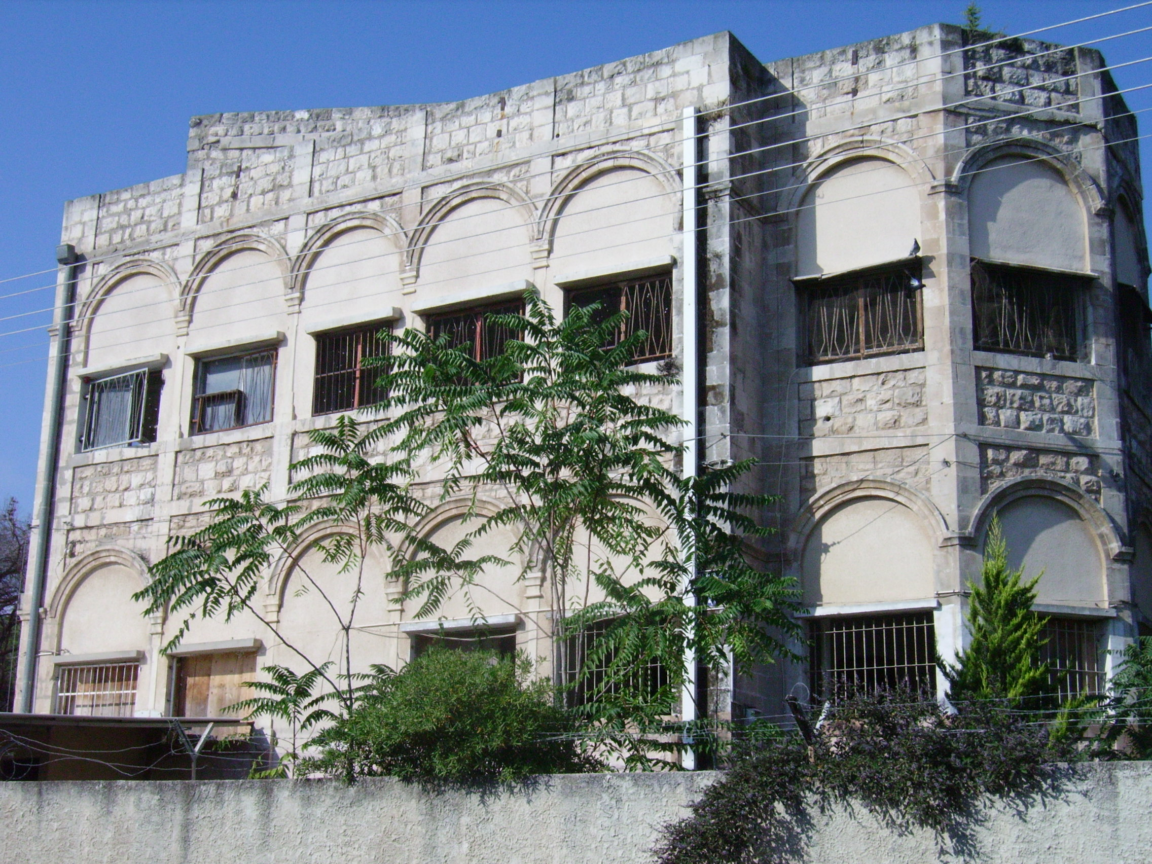 Herzliya Hotels in Haifa, there were three hotels was named "Hotel Herzliya" established in the first half of the 20th century city of Haifa by David Moshe Halevi - Epstein מלונות הרצליה בחיפה היו שלושה מלונות ששמם היה "מלון הרצליה" שהוקמו במחצית הראשונה של המאה ה-20 בעיר חיפה על ידי דוד משה הלוי-אפשטיין מבנה המלון בכרמל ברחוב יפה נוף 34 לשם עבר בשנת 1928 מהמבנה ברחוב קלר. המבנה שופץ בשנת 2005 חלו שינויים בחזיתו. נקרא היום נוף חנה הצילומים לפני השיפוץ